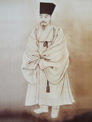 조선 중기의 문신 조광조의 영정